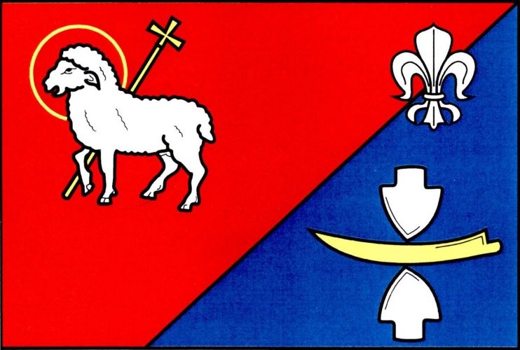 vlajka, Lukov, okres Třebíč